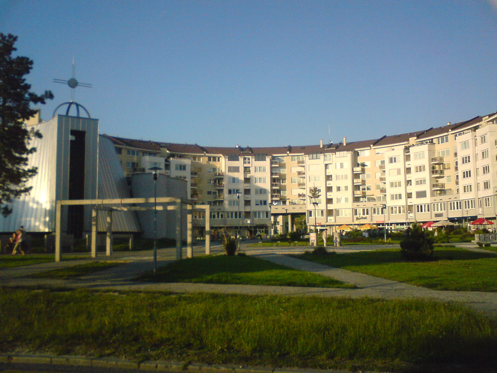 stfrancis square